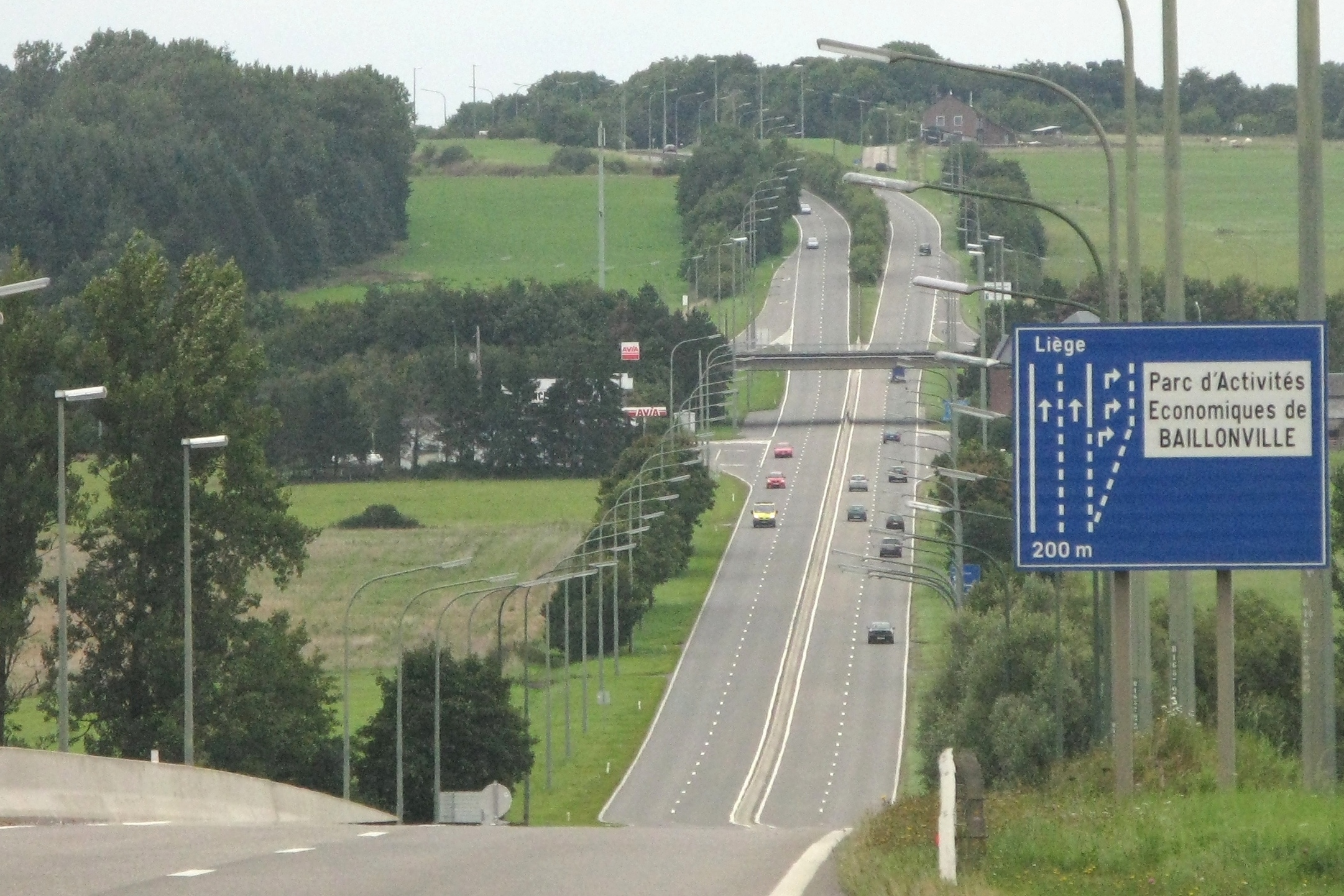 La Nationale 63 vue du Carrefour de Rabosée en Direction de Liège